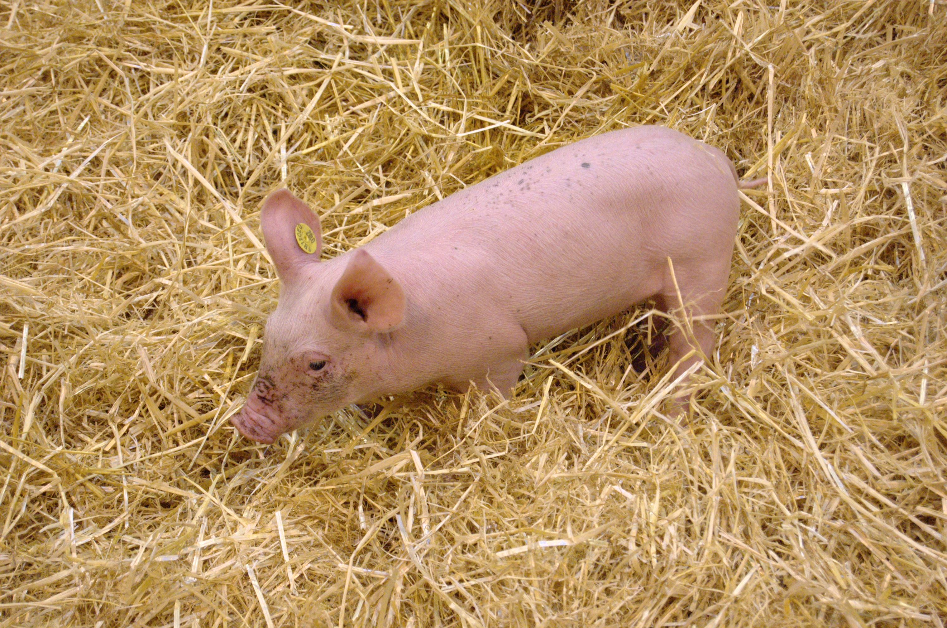 Porcelet - Salon international de l'agriculture 2009 - Paris - France - 22 février 2009.